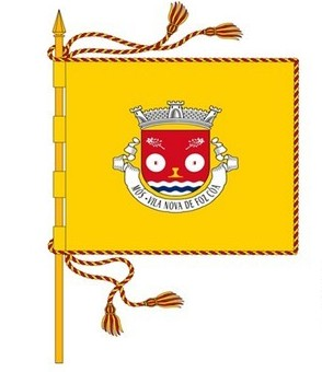 Bandeira da Freguesia de Mós - Vila Nova de Foz Côa